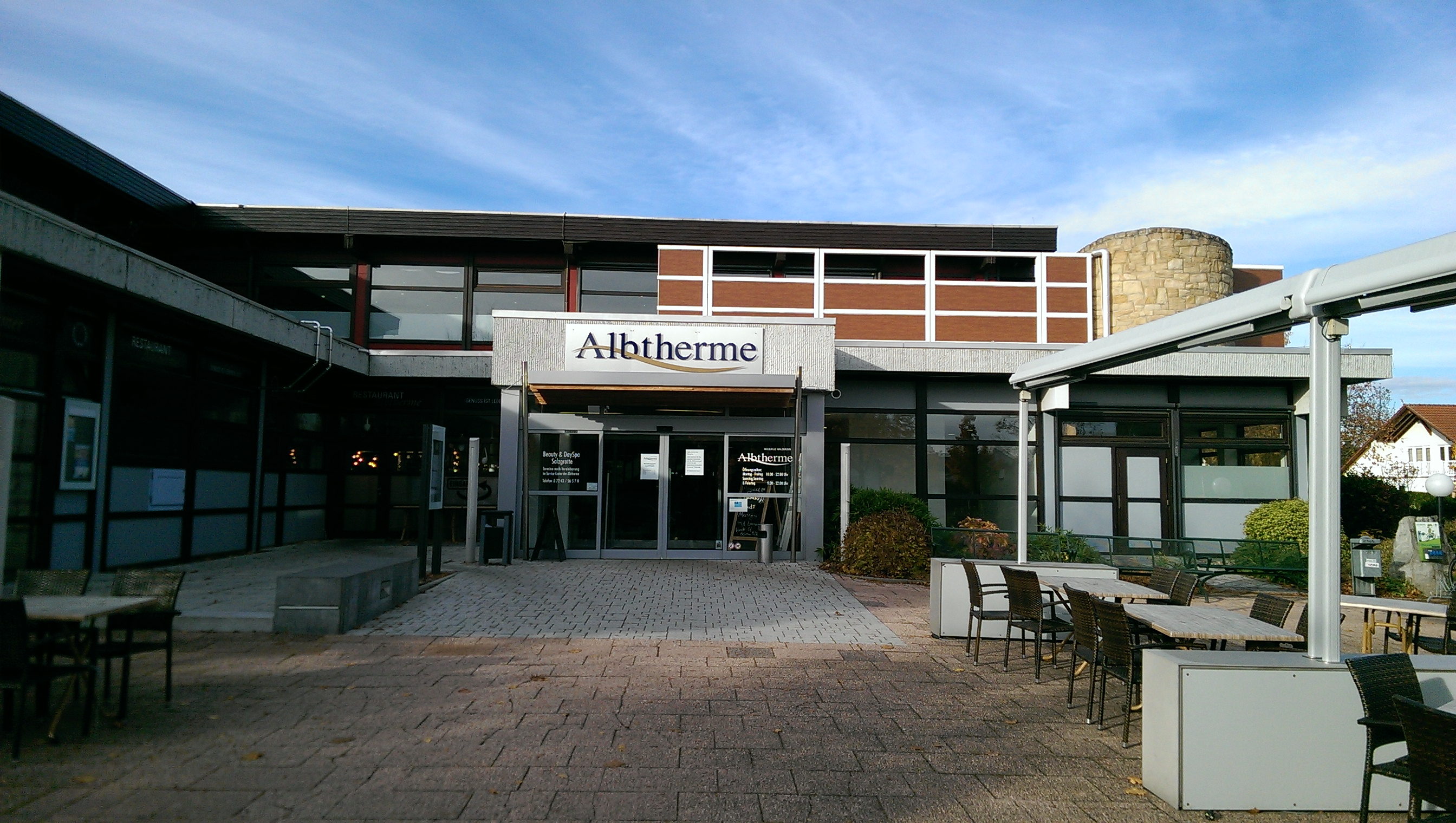 Vorplatz der Albtherme in Waldbronn (Baden-Württemberg).